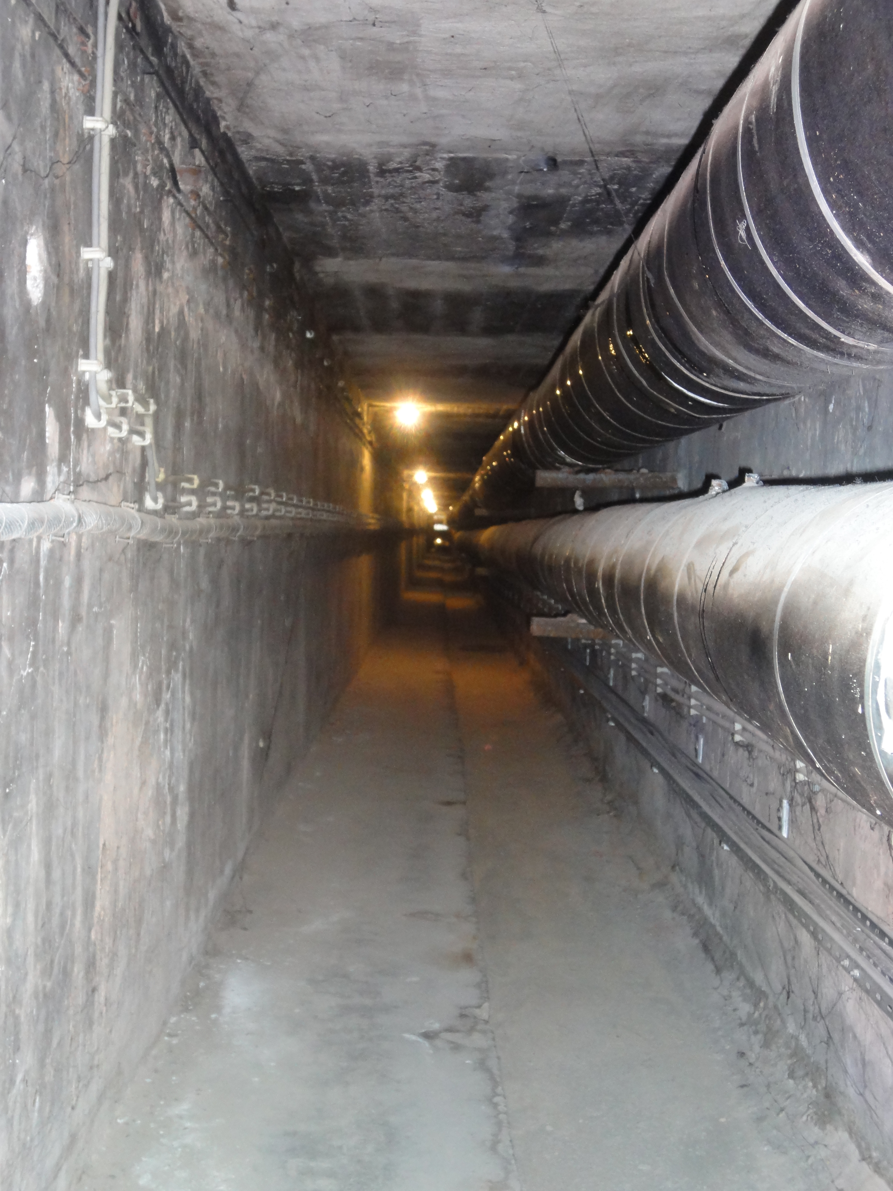 Schachtanlagen der Vitos Herborn ausgehend vom alten Heizwerk aus